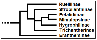 Ruellieae_-_Cladogramma_della_tribù (Acanthaceae)